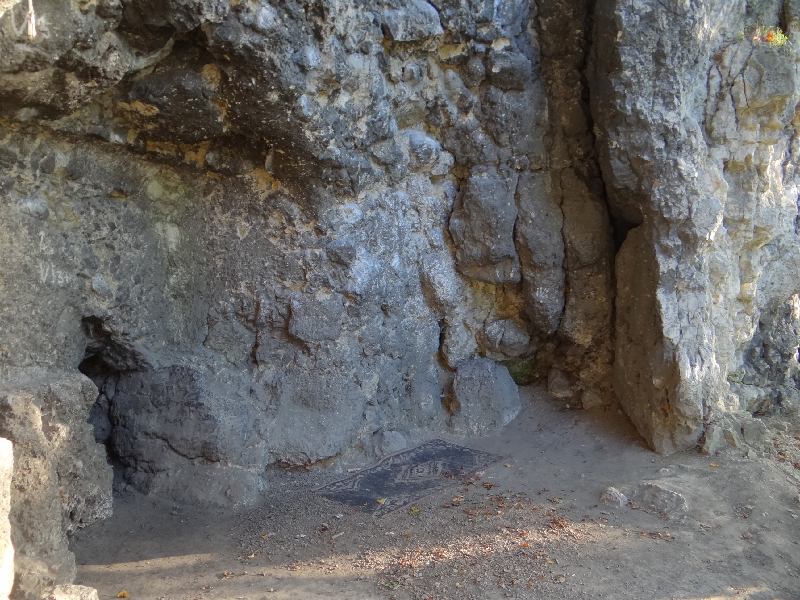 Skała Skurwysyn w Tyńcu nad Wisłą